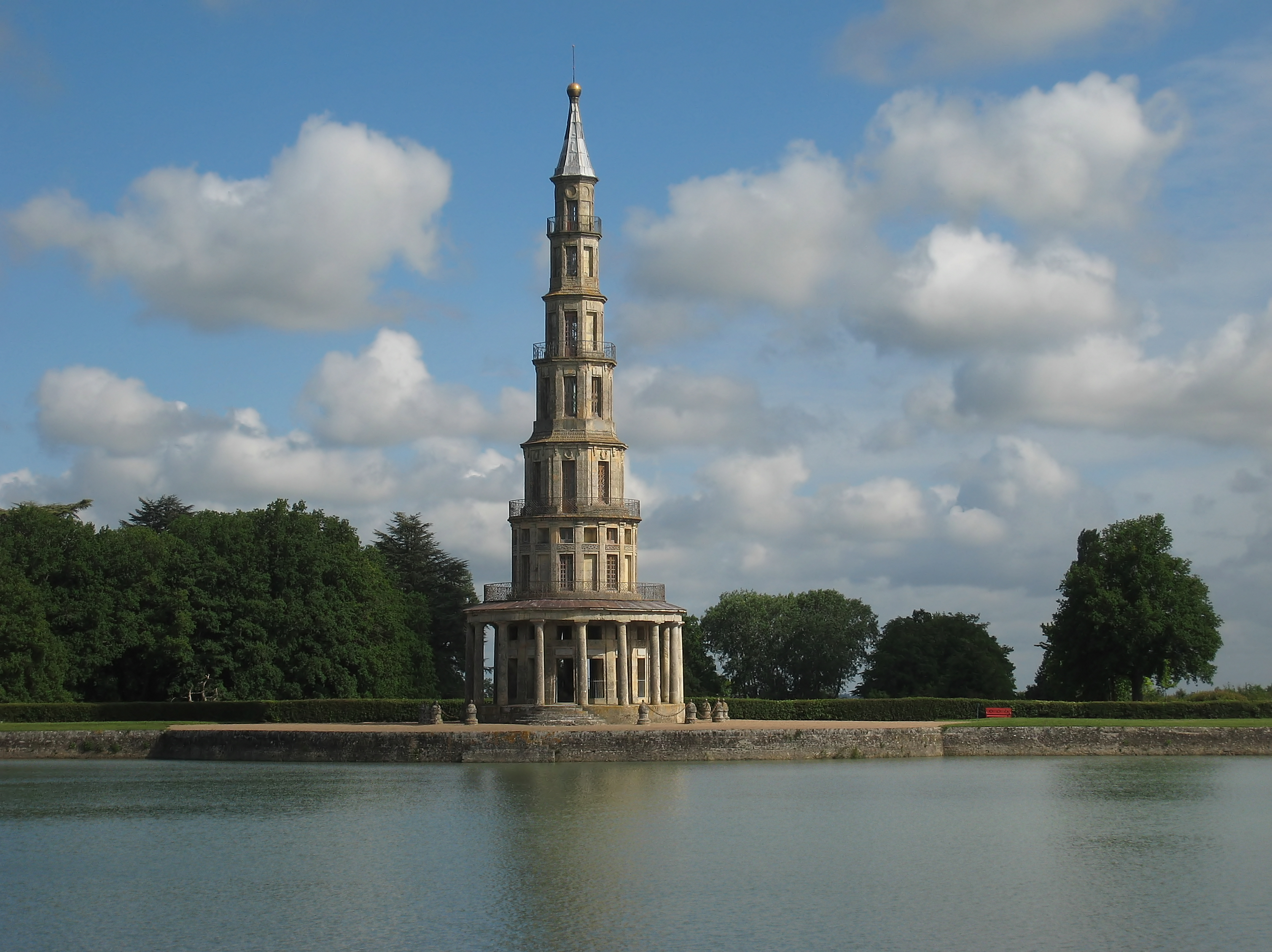 Vom Schloss Chanteloup nahe Amboise ist nur die 40 m hohe Pagode übriggeblieben. Von dem Aussichtsturm aus konnte die Jagd verfolgt werden.